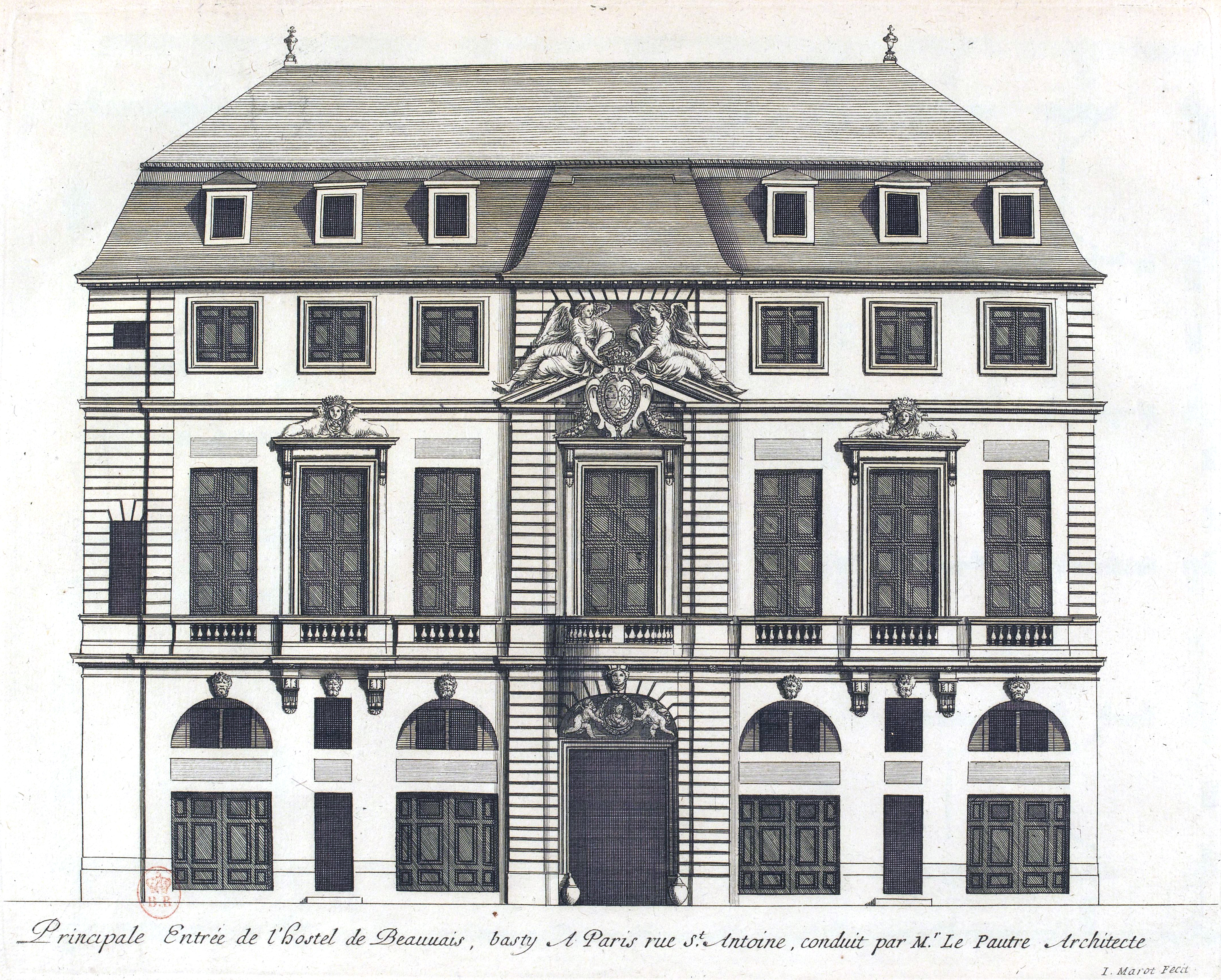 Plate from Jean Marot's L'Architecture française